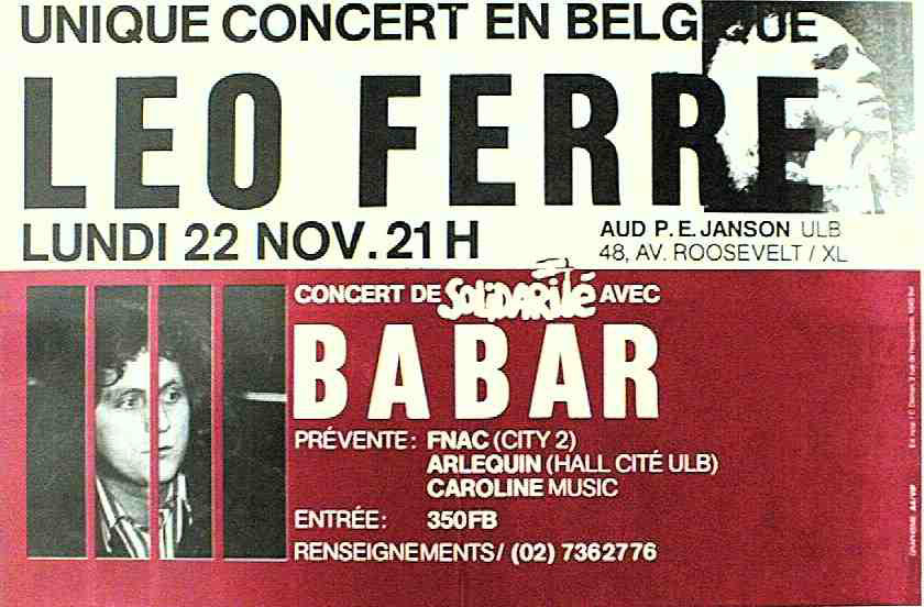 Unique concert en Belgique : Léo Ferré, concert de solidarité avec Babar